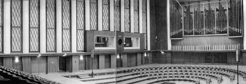 Zentralbild Sturm 8.2.56 Neuer moderner Komplex für die künstlerische Produktion im Funkhaus Berlin Der am 16. Februar 1955 durch Brandstiftung zerstörte große Sendesaal des Staatlichen Rundfunkkomitees Berlin, Nalepastrasse, ist nach modernsten Gesichtspunkten wiederaufgebaut worden. Daneben wurden einige kleinere Sendesäle eingerichtet. Zu jedem Saal gehört ein Regieraum. Am 8.2.56 fand im Funkhaus eine Pressekonferenz statt mit anschliessender Besichtigung der neuen Räume durch Pressevertreter. UBz: Der große Sendesaal des Funkhauses, der für große Orchester, gegebenenfalls mit Chor und Orgel, bestimmt ist. Sein Volumen beträgt ca 12.000 m³ (eins zwei null null null) (Panorama) .